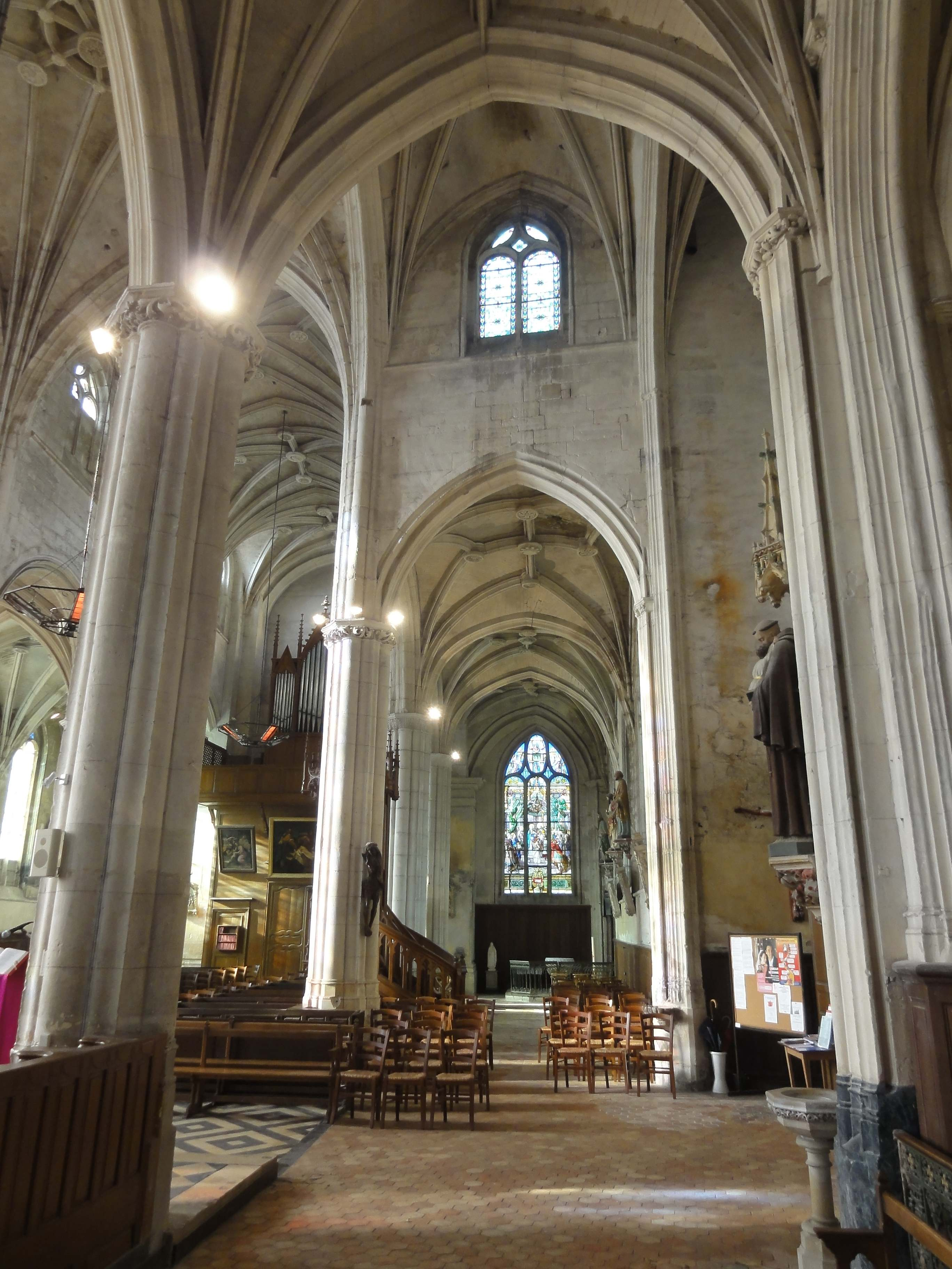 Intérieur de l'église - voir titre.